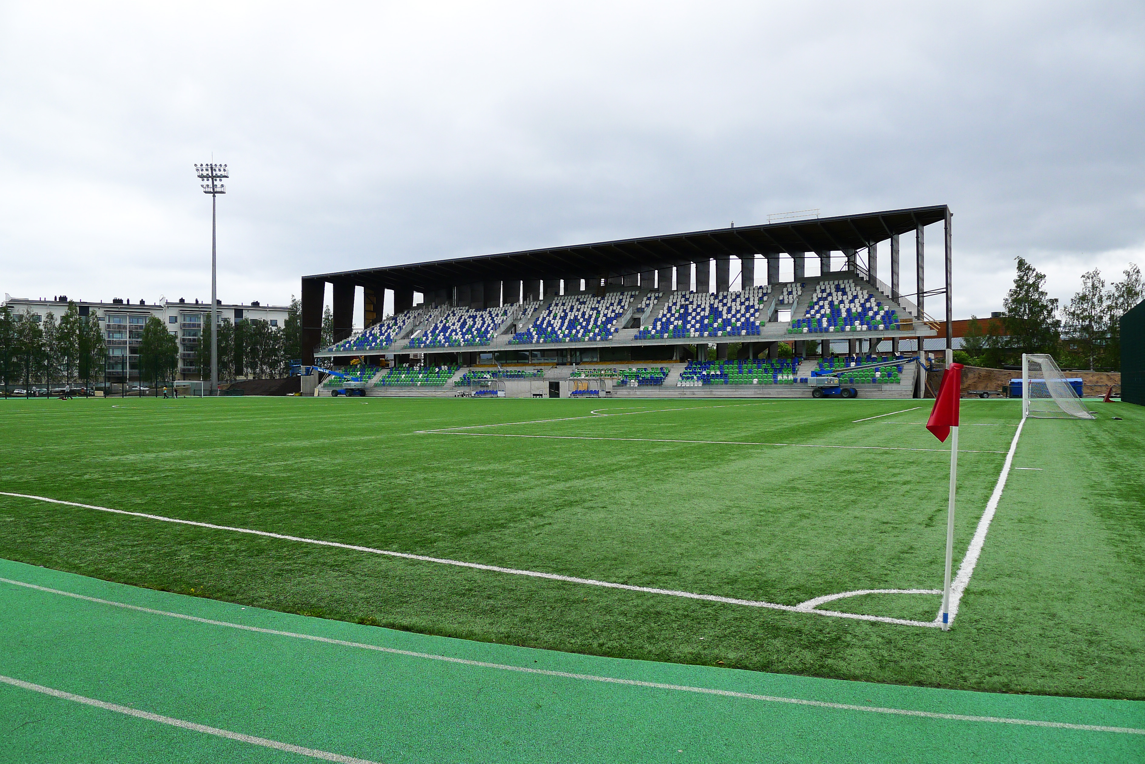 Rovaniemen keskuskenttä 27.6.2015